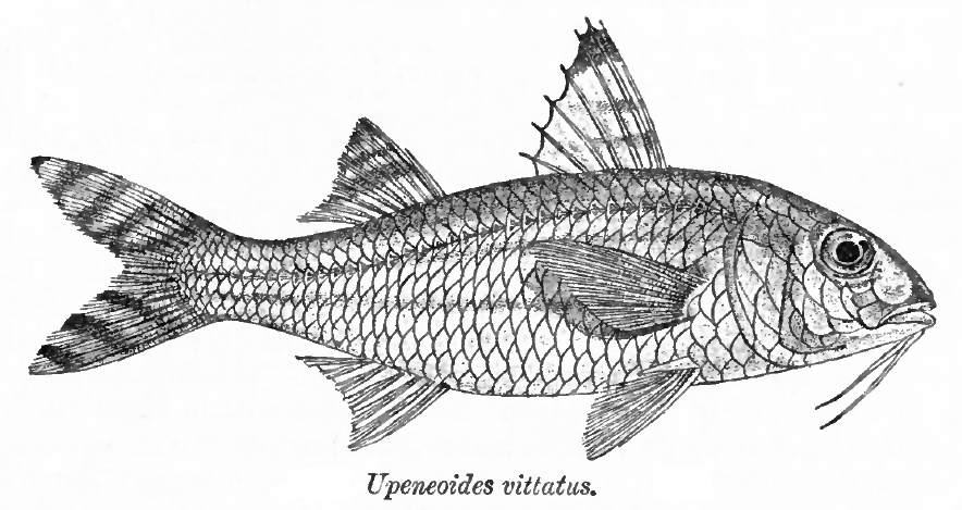 Upeneoides vittatus = Upeneus vittatus (Forsskål, 1775)